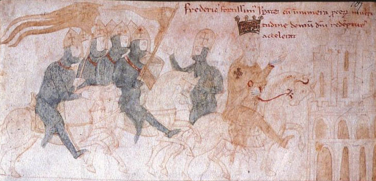 Barbarossa na 3 křížové výpravě